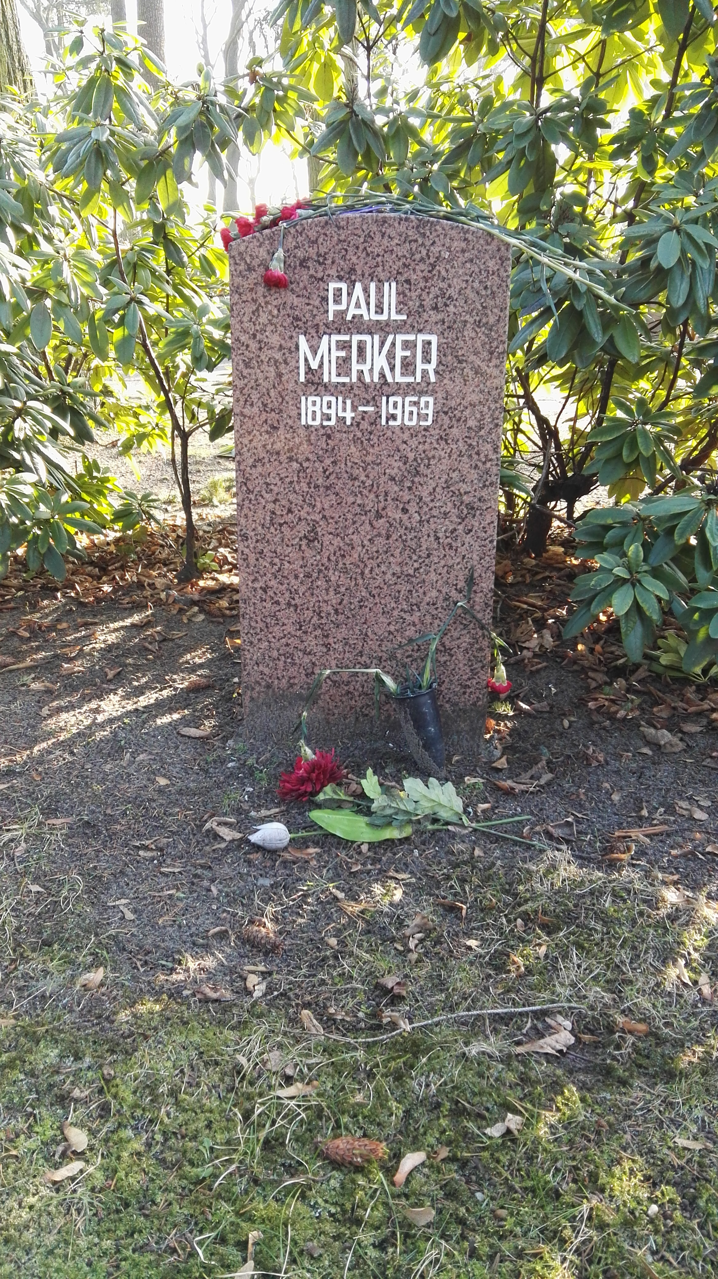 Grab von Paul Merker in der Grabanlage Pergolenweg auf dem Sozialistenfriedhof des Zentralfriedhofs Friedrichsfelde